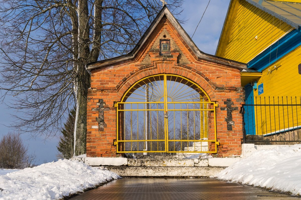 Кублішчына. Свята-Троіцкая царква